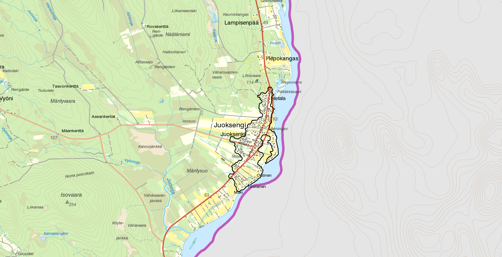 Tätorten Juoksengi med gränserna från Statistiska centralbyråns tätortsavgränsning 2015. Bakgrundskarta från Lantmäteriet, skala 1:30 236.